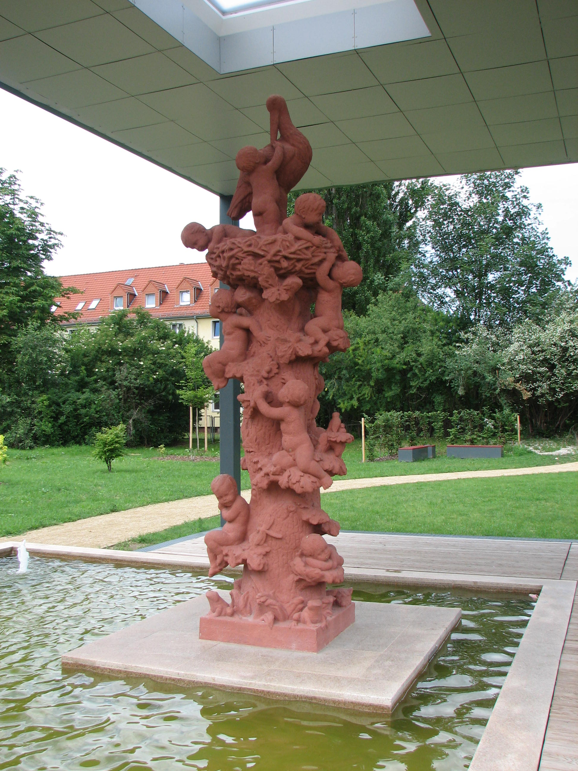 Die der Straße zugewandte Seite des 2012 sanierten Storchenbrunnens.